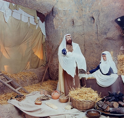 immagine dal sito - inserita direttamente dal webmaster